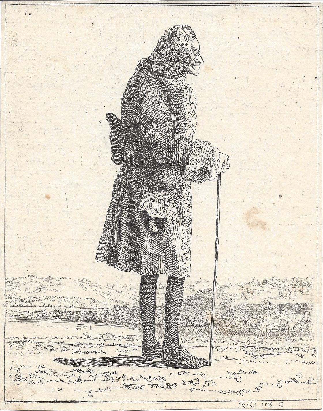 Jean Huber-Voltaire: Voltaire am Genfer See nach rechts blickend, 1778.